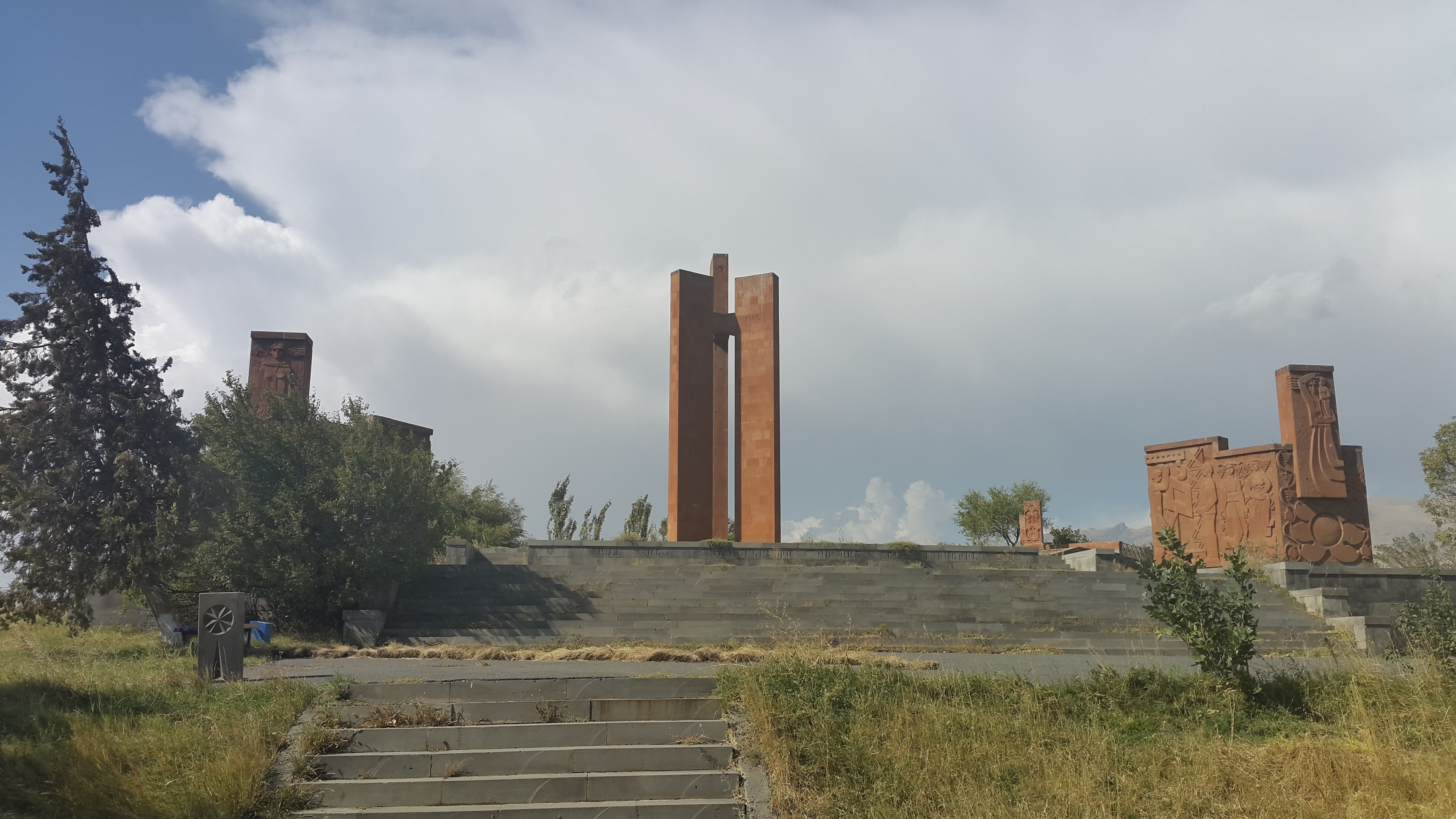 Հուշարձան Երկրորդ աշխարհամարտում զոհվածներին 4/8